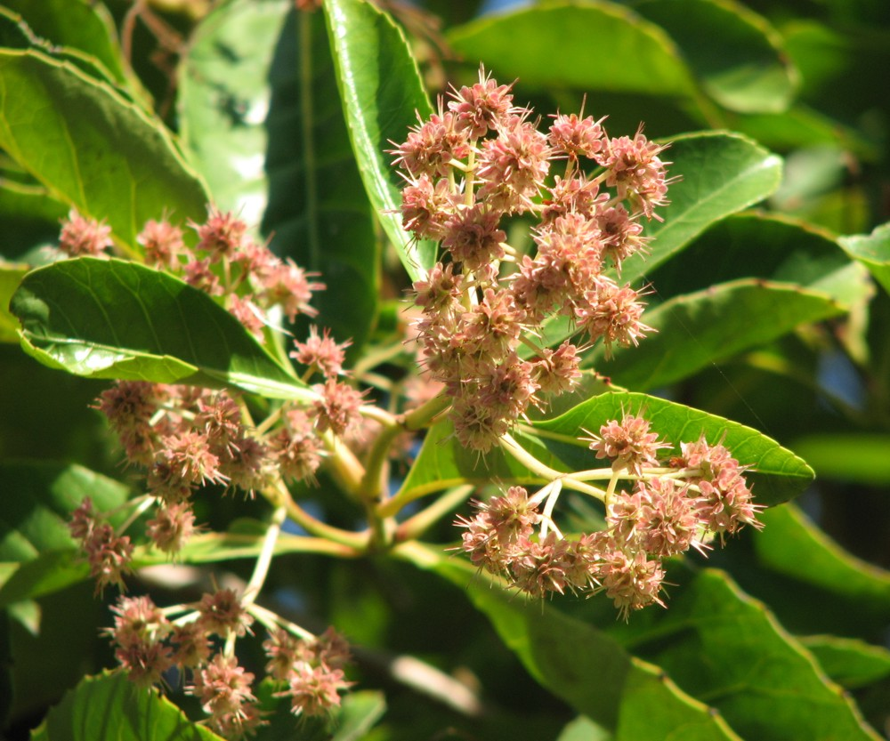 Pullea stutzeri, Royal Botanic Gardens, Melbourne